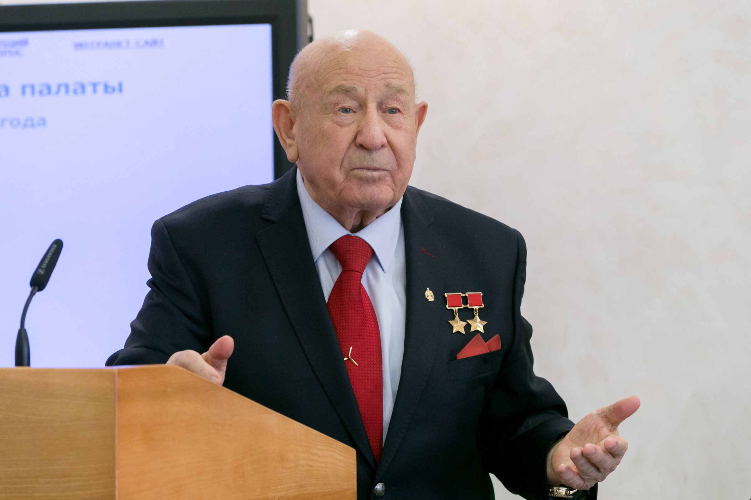 Алексей Архипович Леонов (род.1934) — советский космонавт